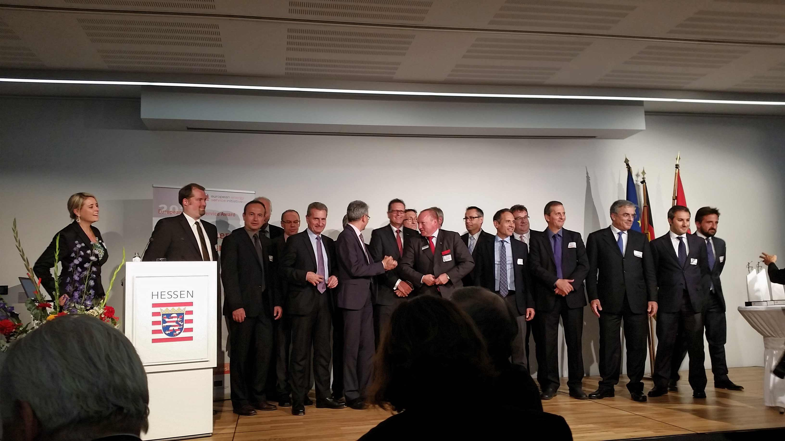 European Energy Service Award 2014. Günther Oettinger (6^ da sinistra) Domenico Casalino (3^ da destra)